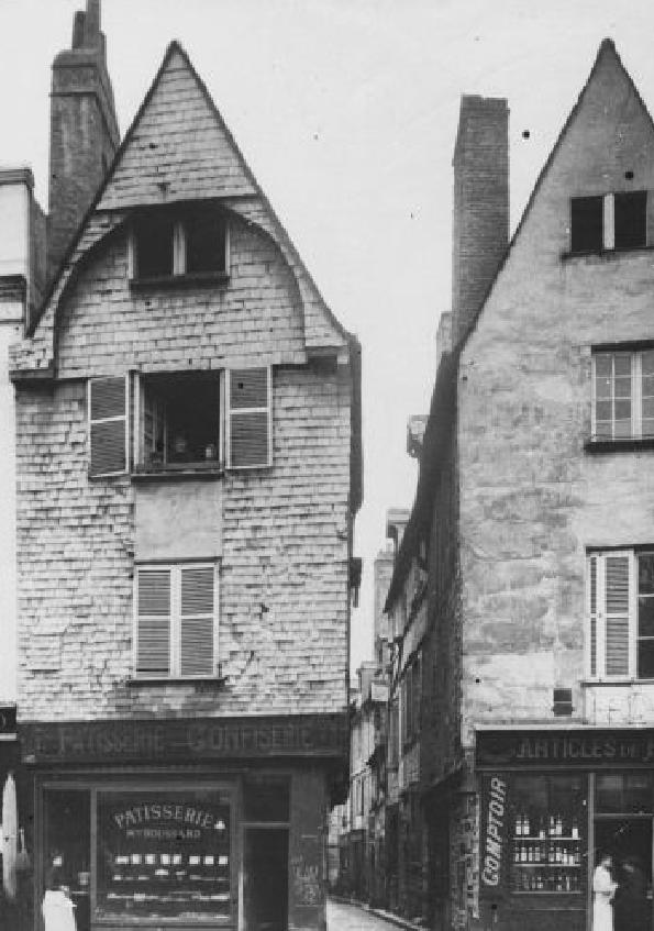 La Maison Bleu, XVe siècle 17 place du Grand Marché, Tours